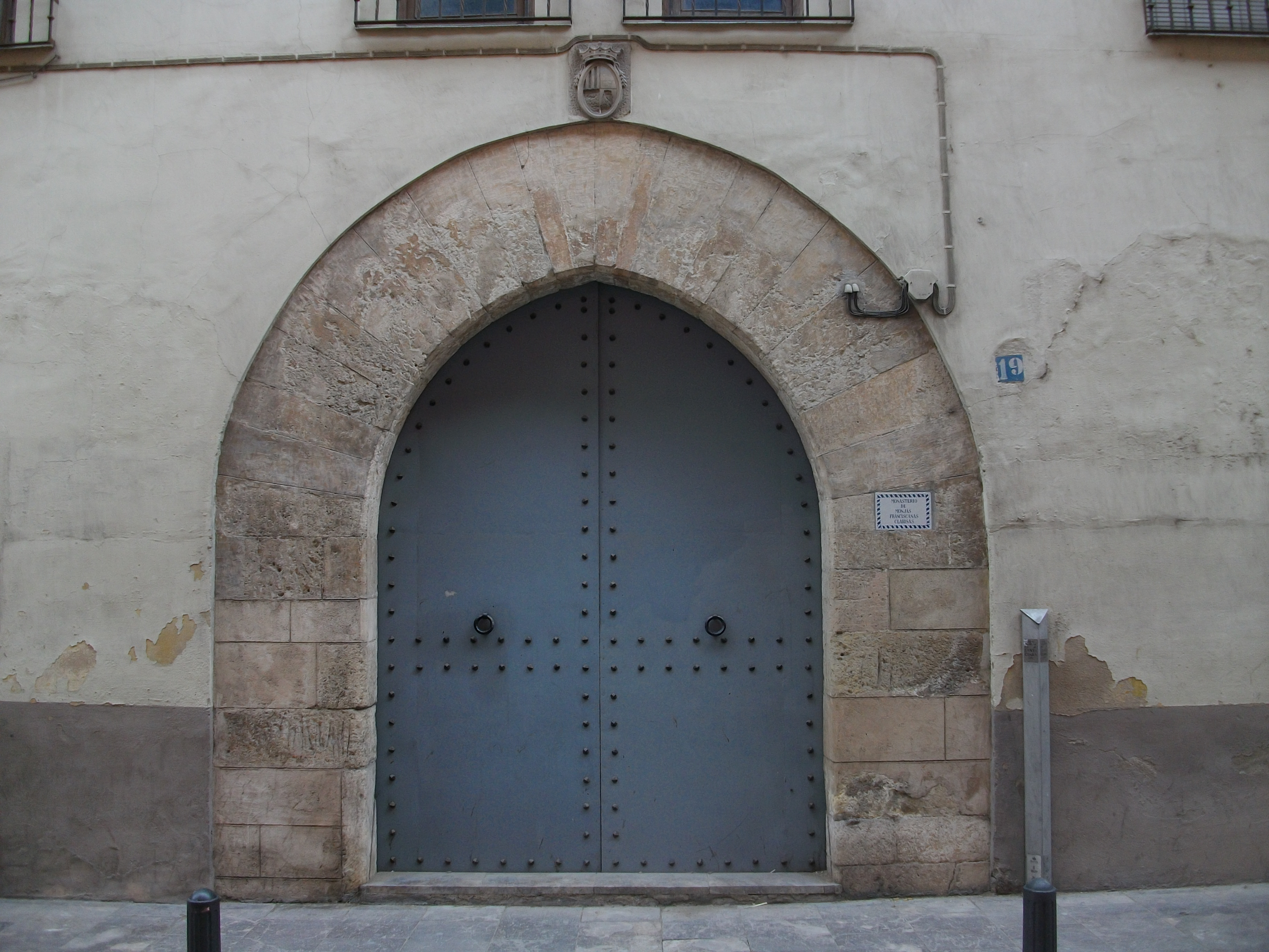 Portada gòtica del monestir de santa Clara de Xàtiva.